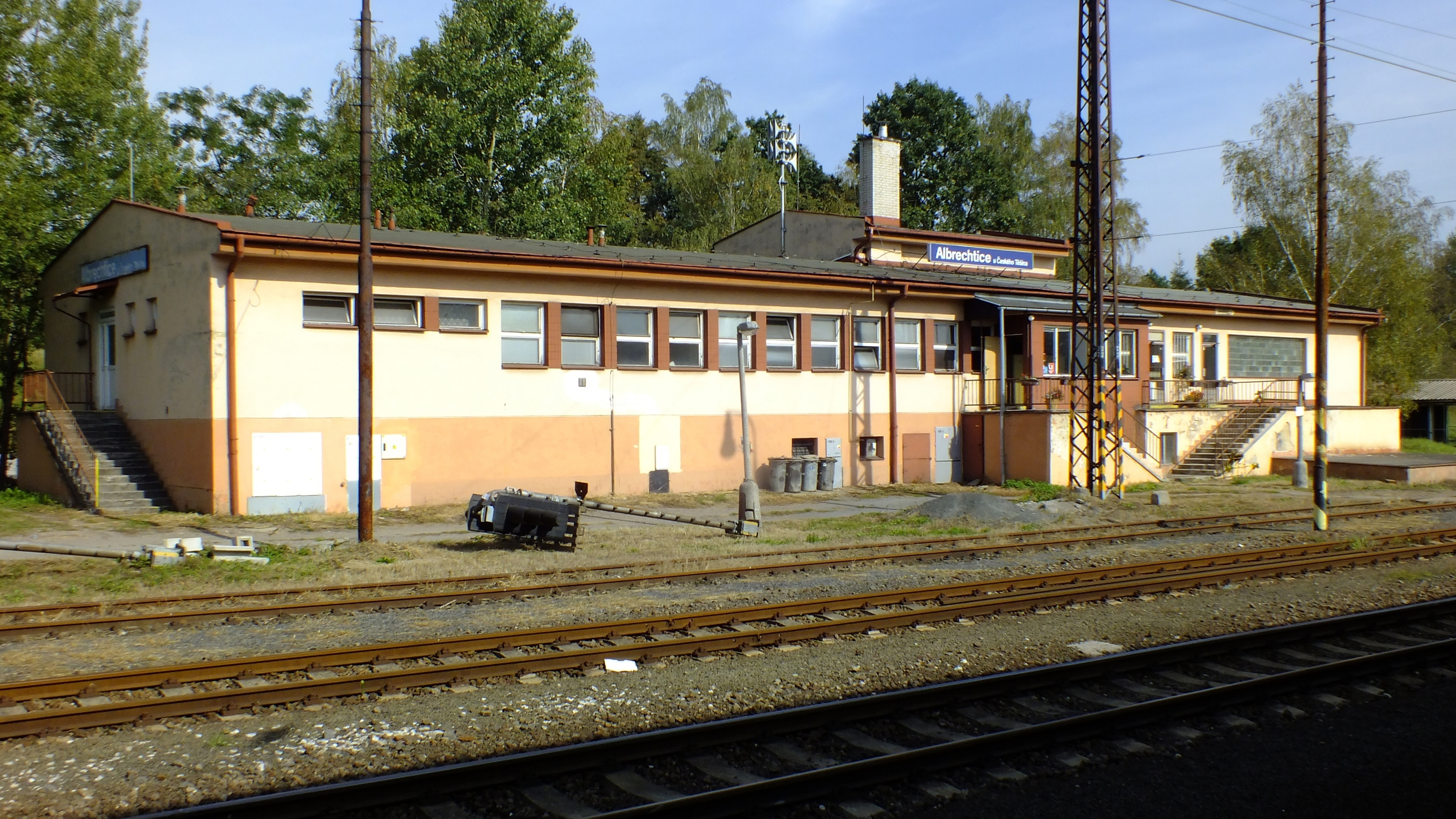 Staniční budova